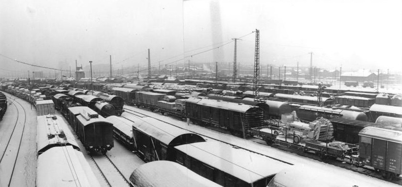 Halle, Güterbahnhof, Güterwaggons, Winter Zentralbild Schaar 17.12.1969 Halle: Eisenbahner sogen für reibungslosen Verkehr-Einen reibungslosen Zugverkehr auf dem Güterbahnhof Halle sicherten auch bei dem starken Schneefall in der Nacht zum 16.12.69 viele Helfer, die Gleise und Weichen vom schnee säuberten. Im gesamten Reichsbahndirektionsbezirk Halle waren über 700 Eisenbahner, unterstützt von Werktätigen aus Betrieben und von Genossenschaftsbauern, zur Schneeräumung eingesetzt. Durch das Bemühen aller Eisenbahner in der gegenwärtigen Witterungsperiode traten beim Güter- und Personenverkehr keine grössere Verspätungen auf. 2teiliges Panoarma